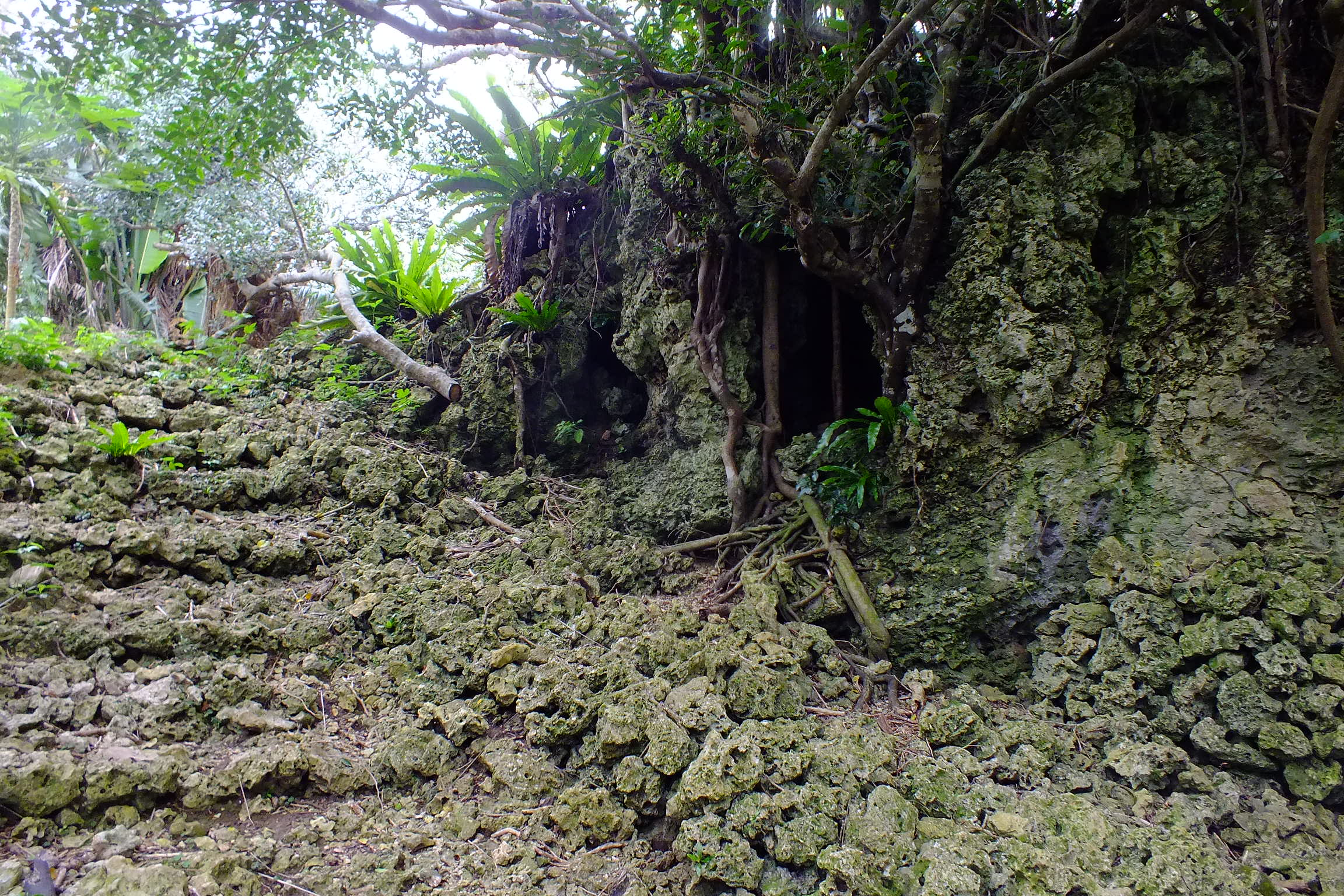 Shimotabaru-jou,Hateruma 下田原城・ぶりぶち公園 波照間島